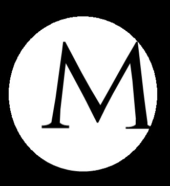 mirtha